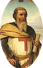 João I de Brienne